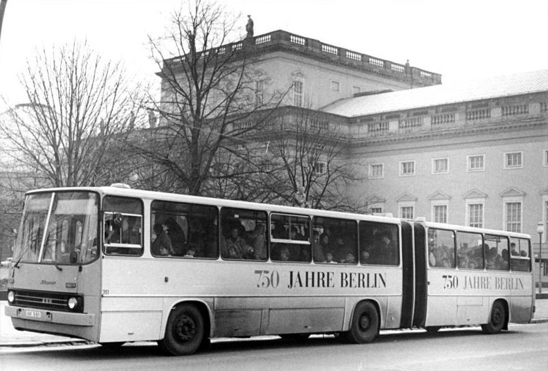 ADN-ZB Ritter 17.3.87 Berlin: Jubiläum. Im Stadtbild weisen nunmehr Busse der BVB mit Aufschriften auf das 750jährige Berlin-Jubiläum hin.